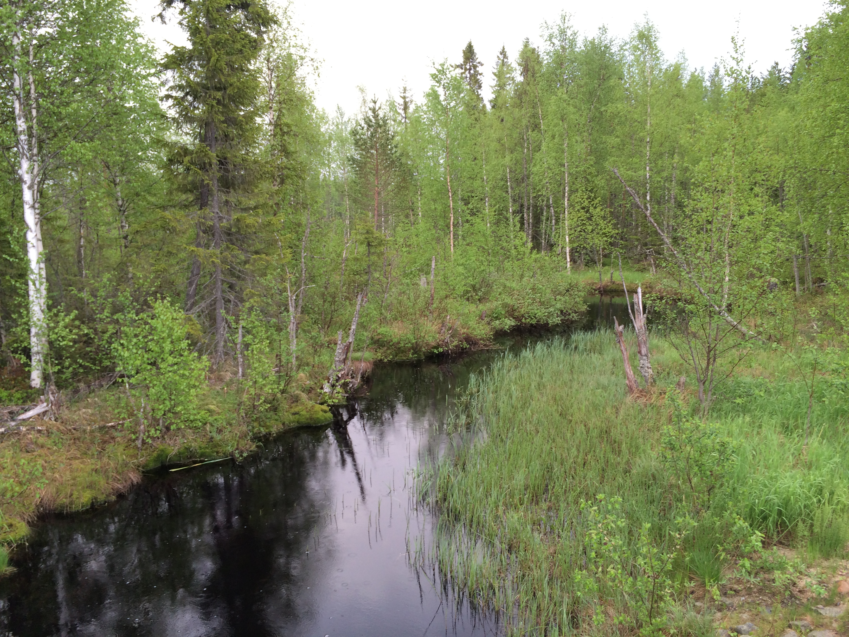 река Марья (Карелия)